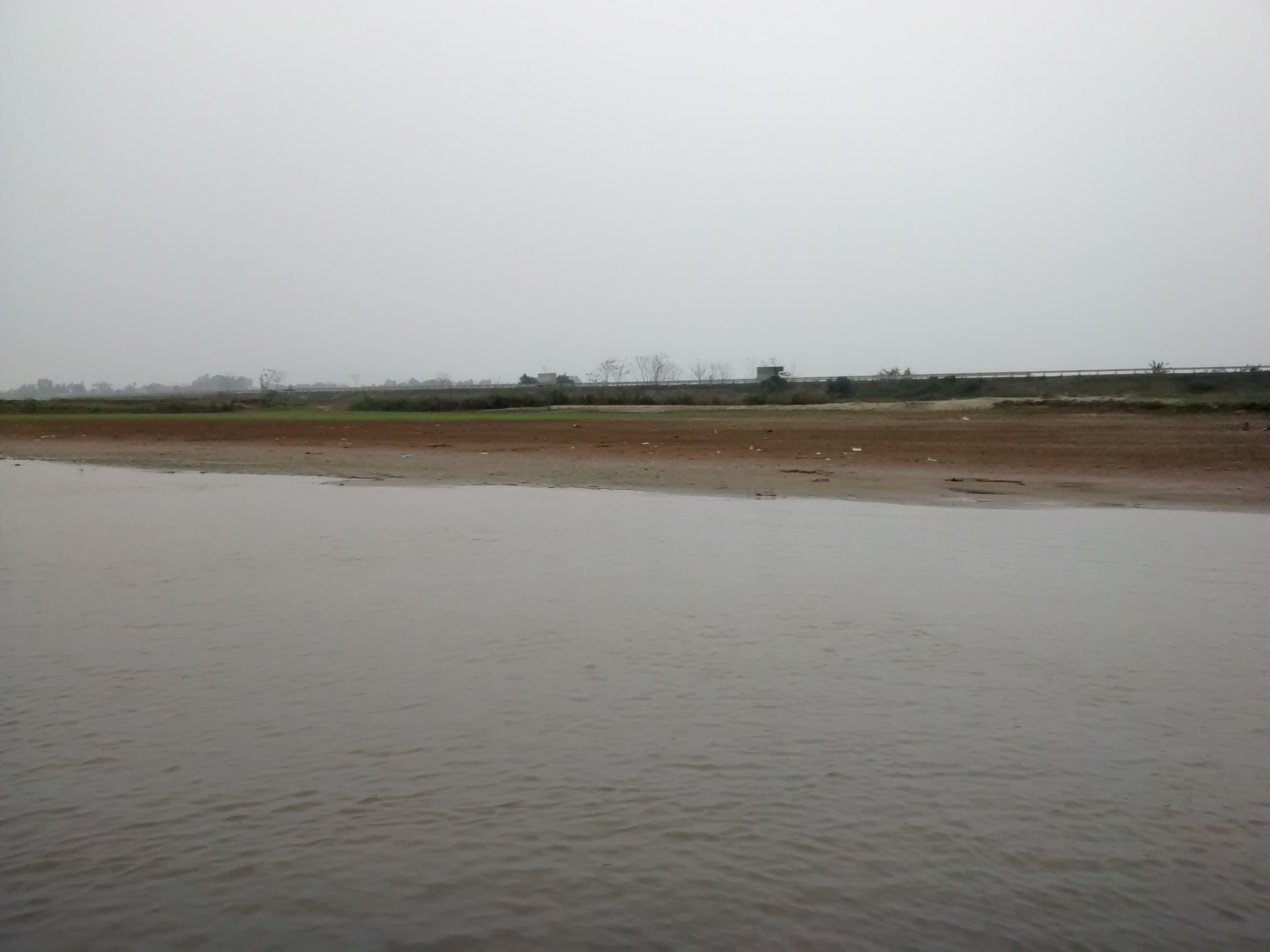 Khúc sông Thao tại bến đò Chí Chủ